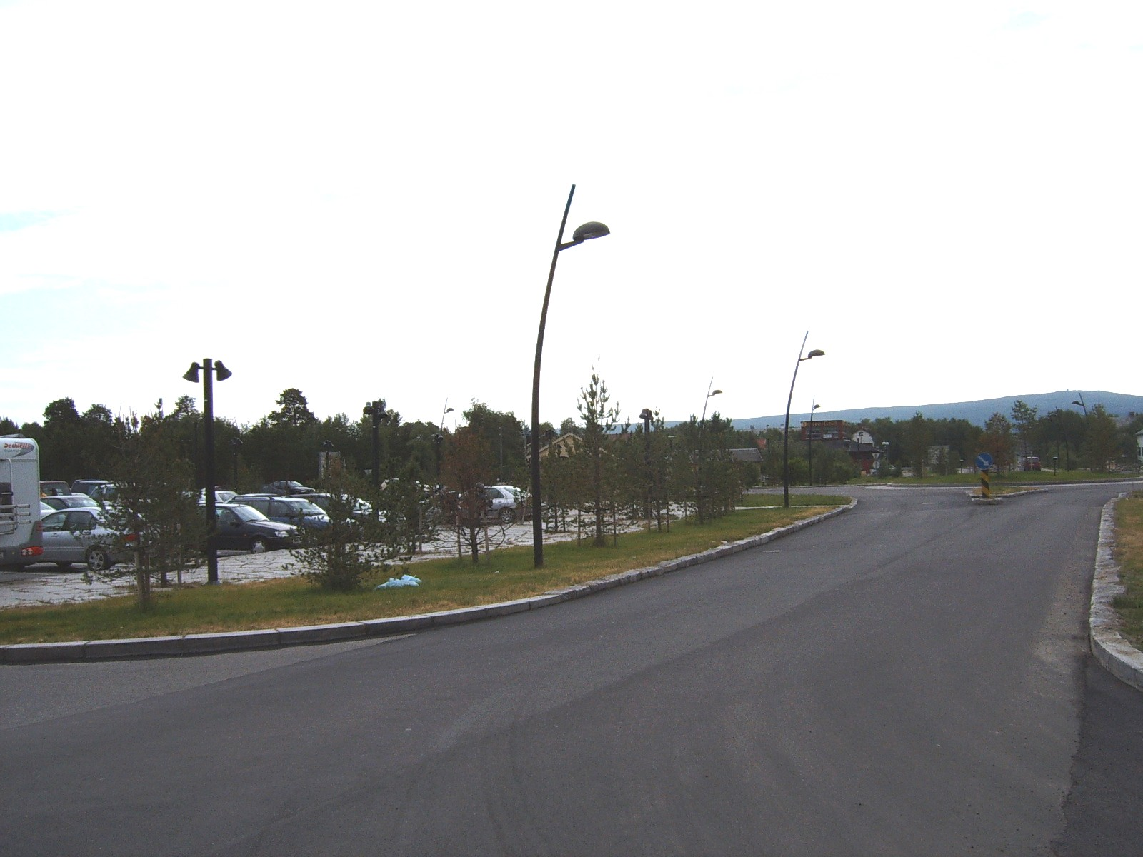 Karasjok main square